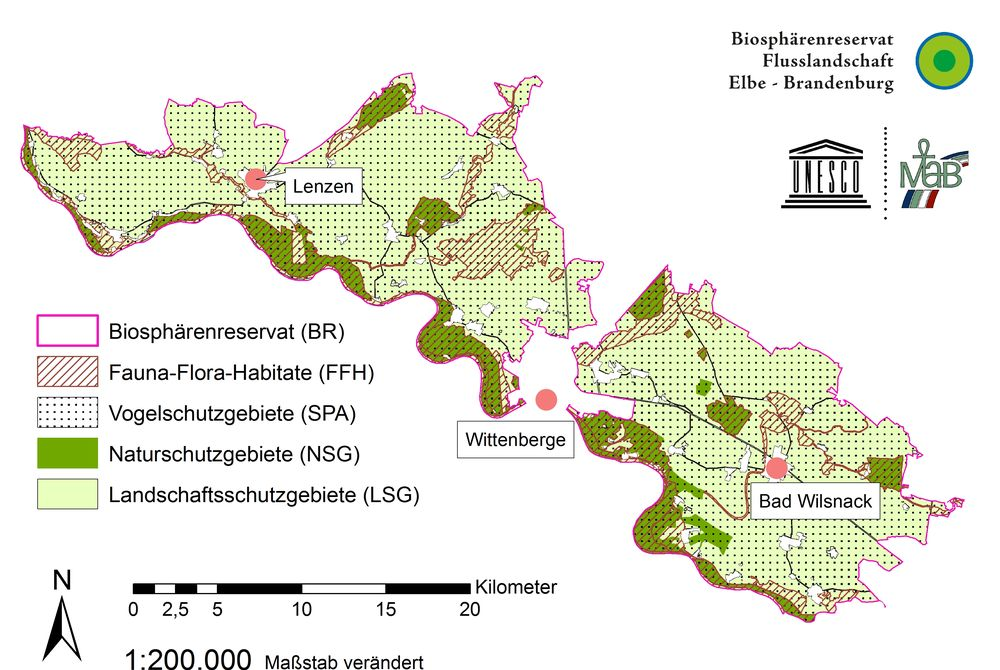 Fauna-Flora-Habitat-Gebiete, Europäische Vogelschutzgebiete (SPA), Naturschutzgebiete und Landschaftsschutzgebiete im Biosphärenreservat Flusslandschaft Elbe - Brandenburg.